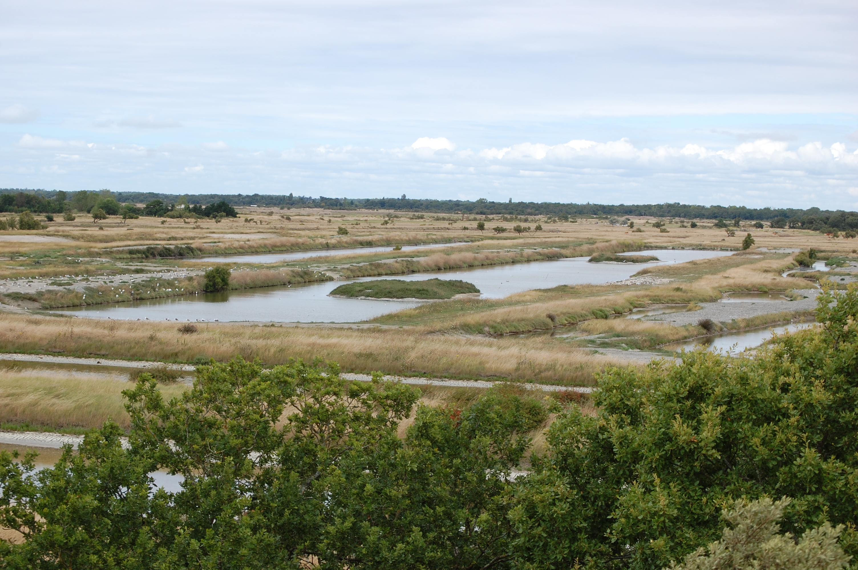 2009-07_Oleron_065